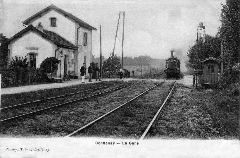 C'est encore une halte utilisant le bâtiment du garde barrière